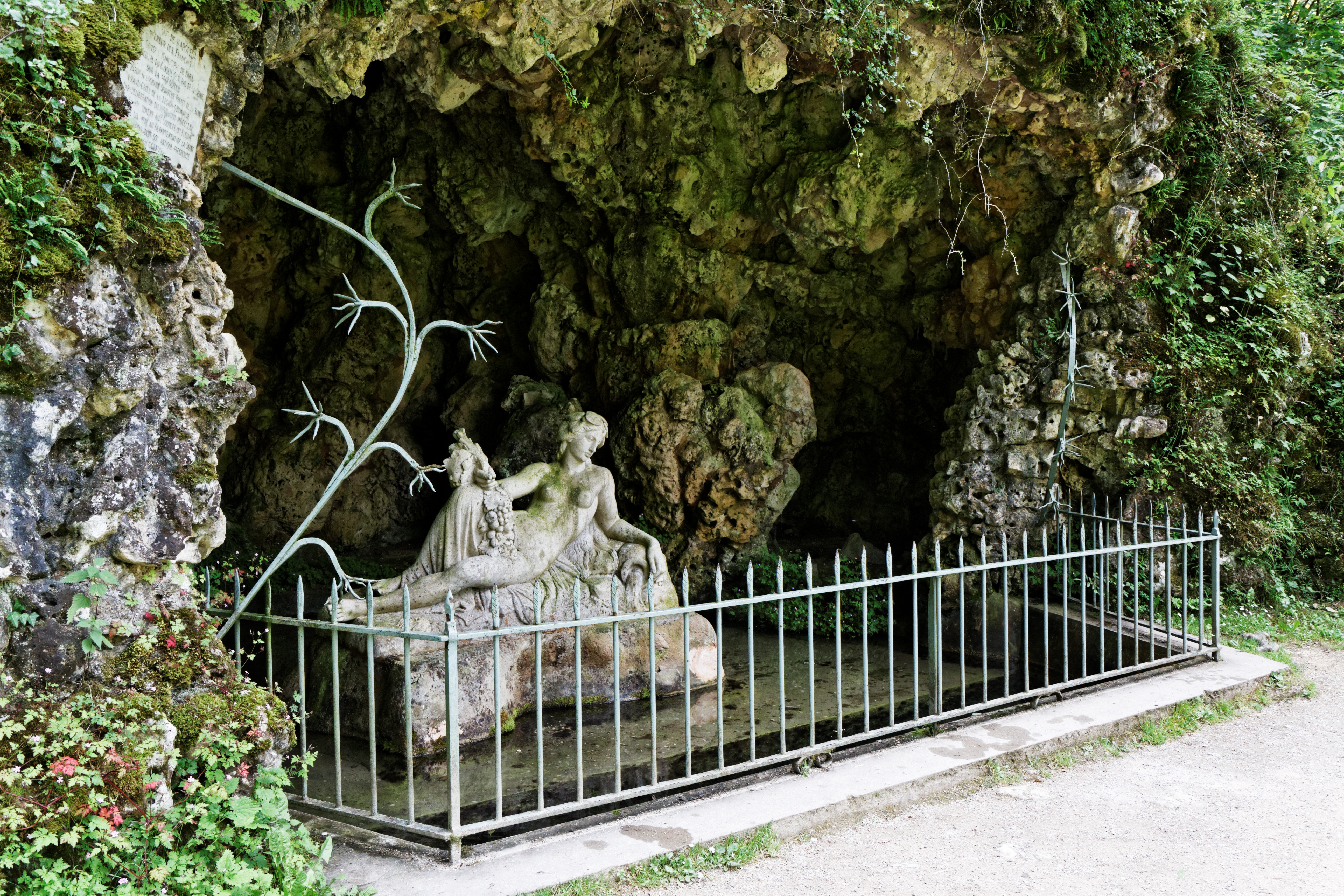 Les sources de la Seine à Source-Seine.